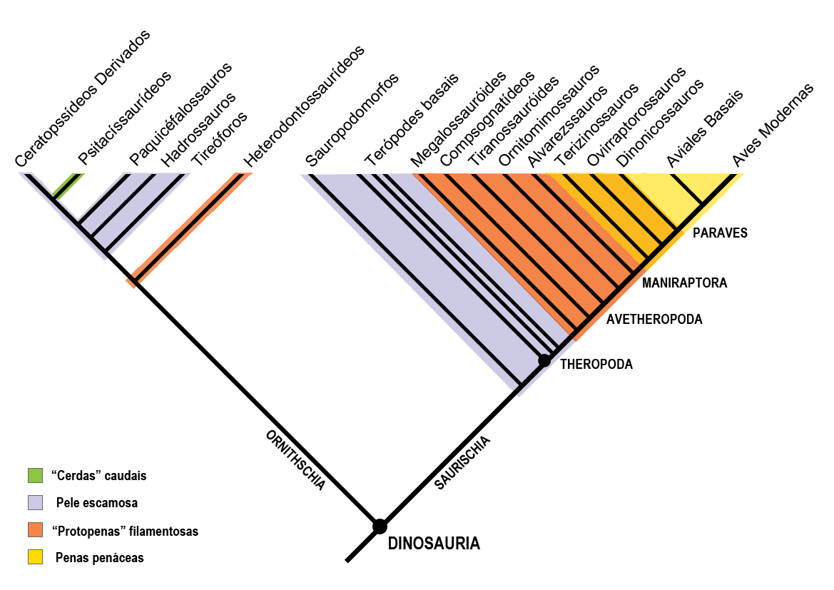 Cladograma de Presença de Penas em Dinossauros